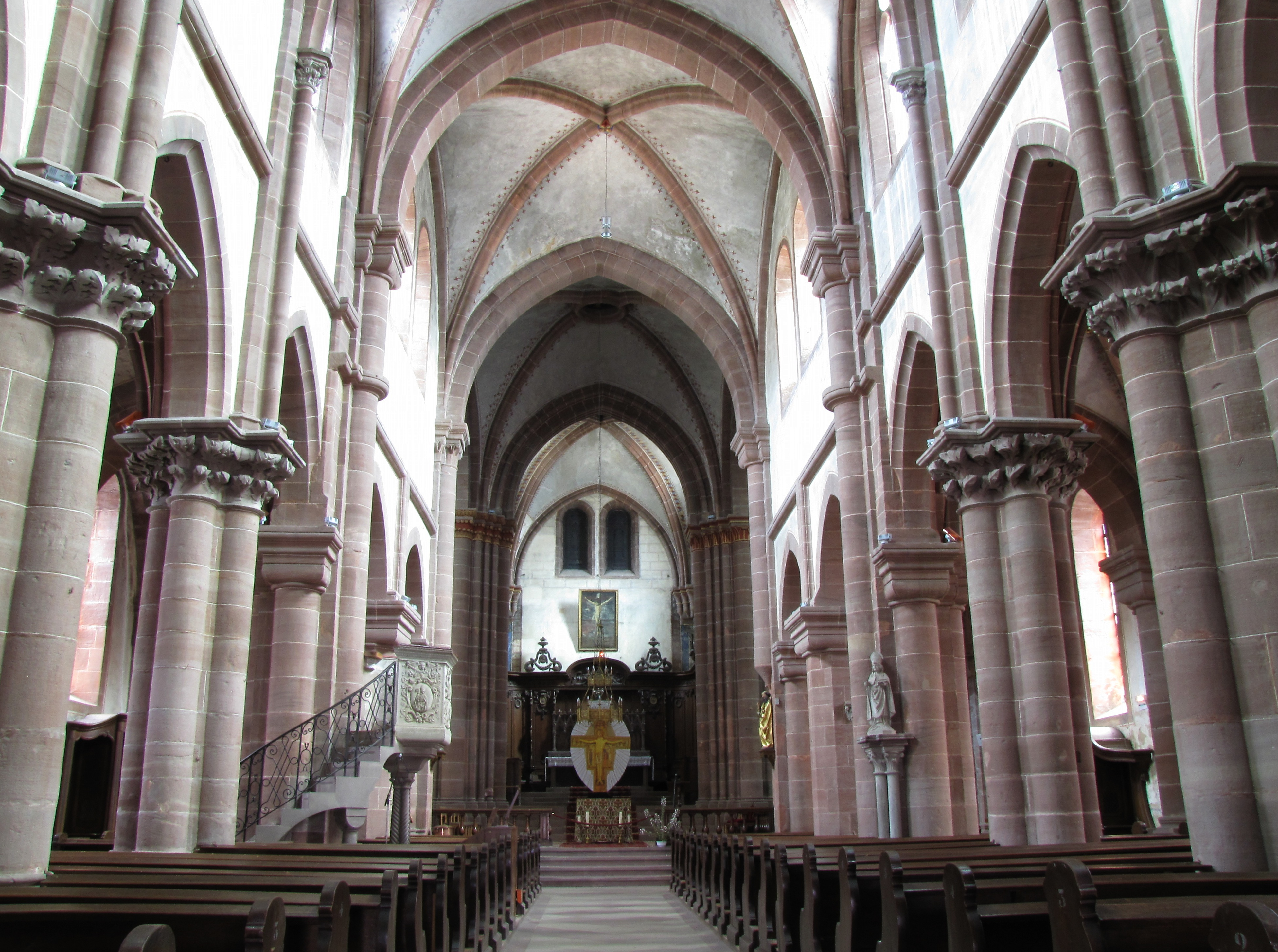 Alsace, Bas-Rhin, Neuwiller-lès-Saverne, Église abbatiale Saints-Pierre et Paul (PA00084820, IA67009917: Vue intérieure de la nef vers le chœur, Travées gothiques (XIIIe) et travée-double romane (XIIe).